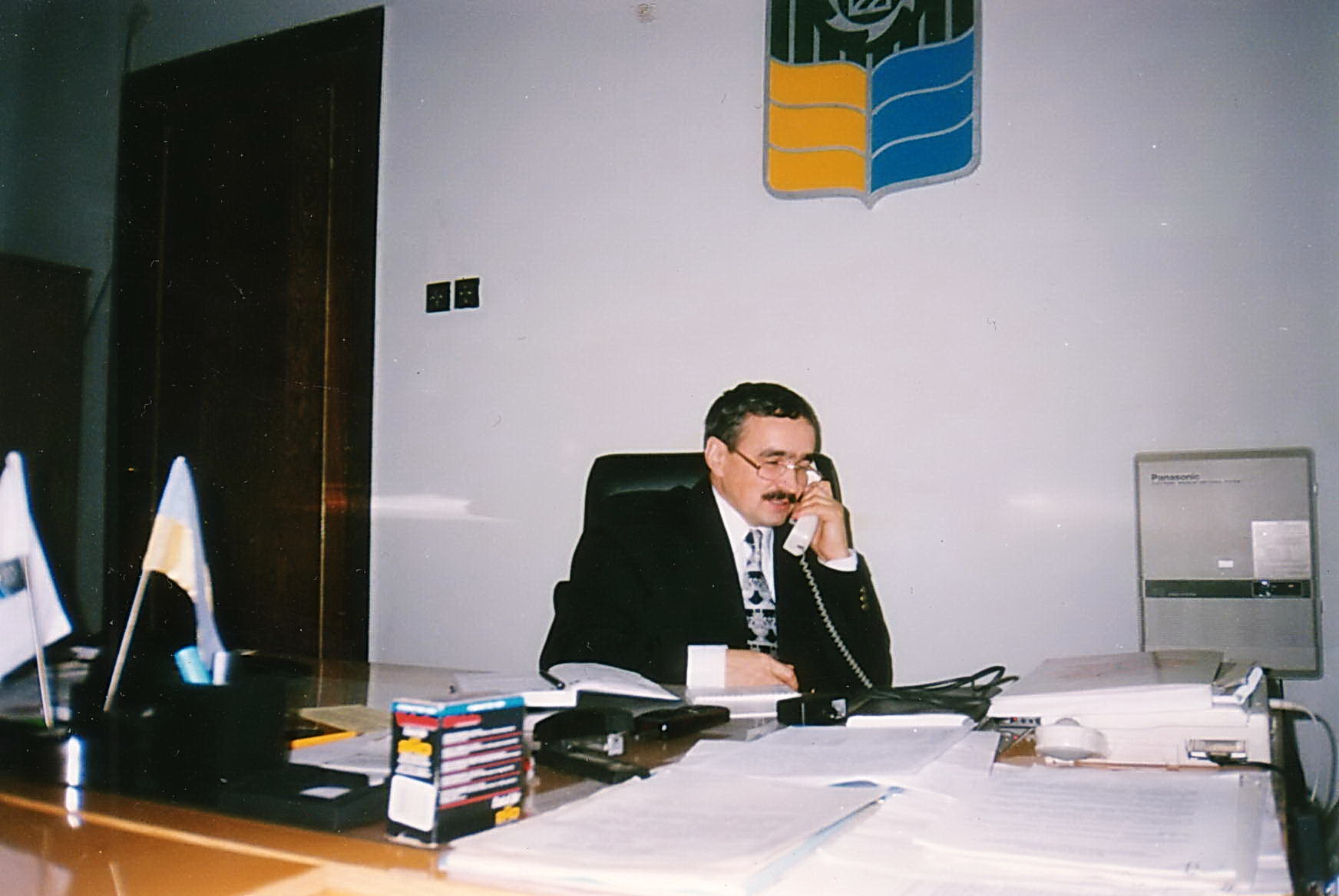 Степан Цапюк в день свого 45-річчя, 26.01.1999 року